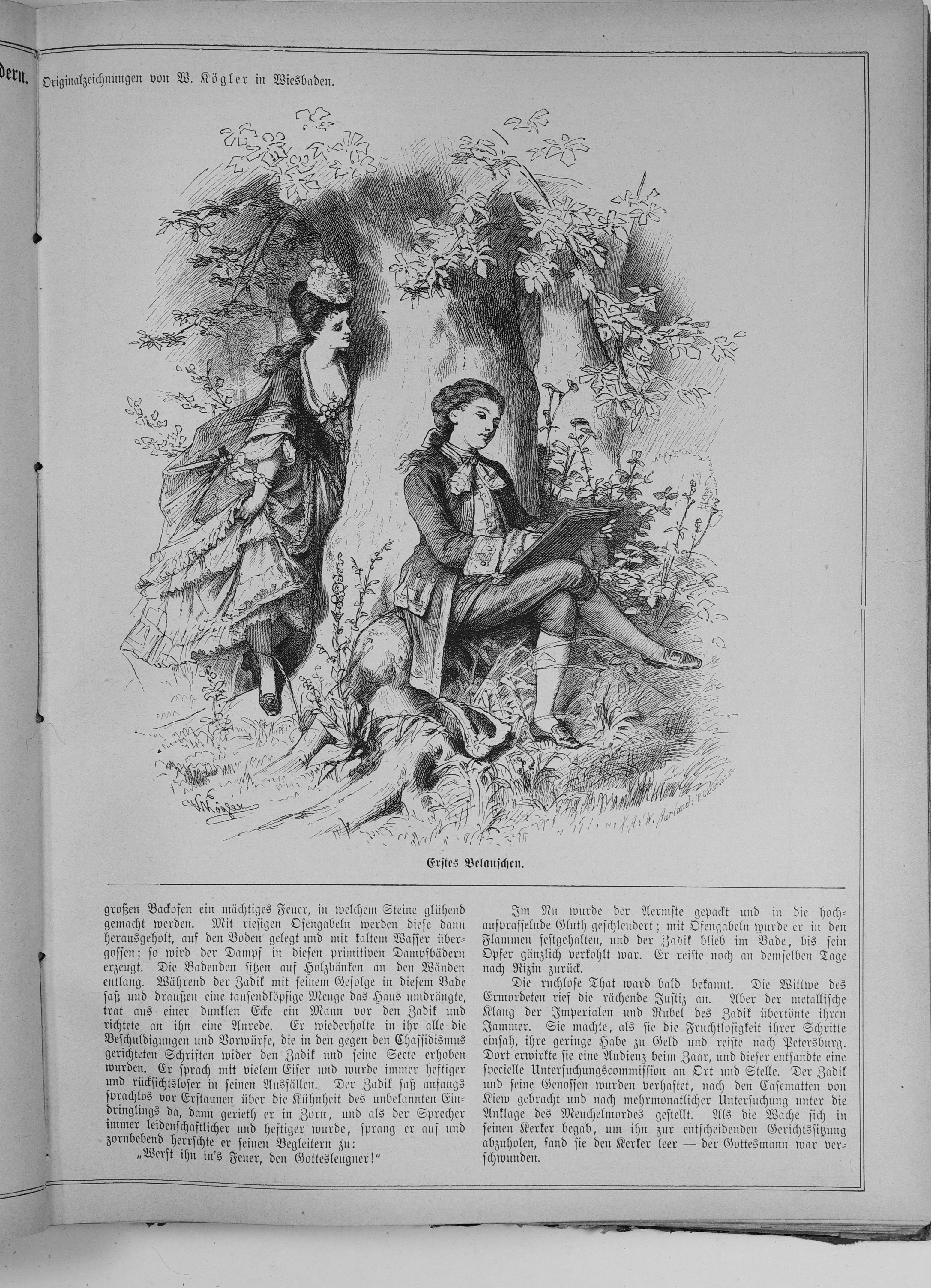 Seite 473 aus "Die Gartenlaube". Page 473 from journal Die Gartenlaube for 1876. Extracted image (if any): File:Die Gartenlaube (1876) b 473.jpg - hi res, ~2.5 MB.